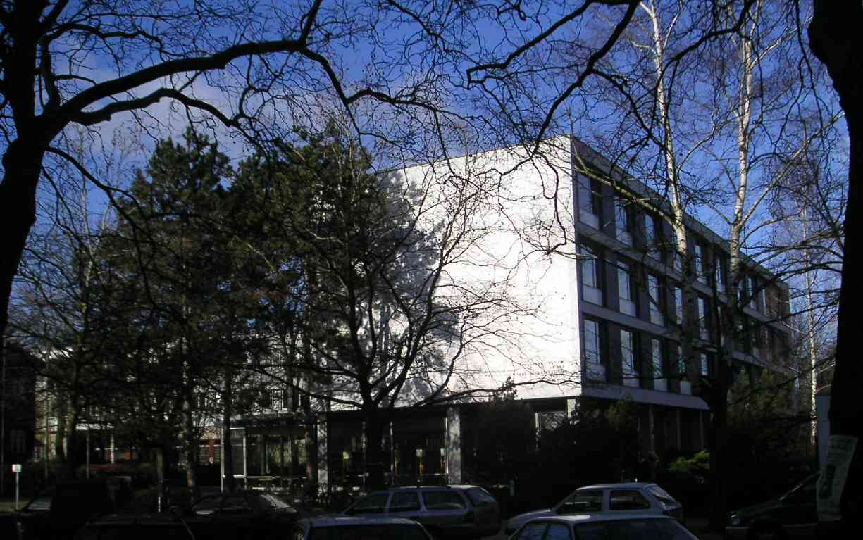 Freie Universität Berlin: Otto-Suhr-Institut - Gebäude Ihnestr. 21 Freie Universität Berlin - Otto-Suhr-Institut - Gebäude Ihnestr. 21